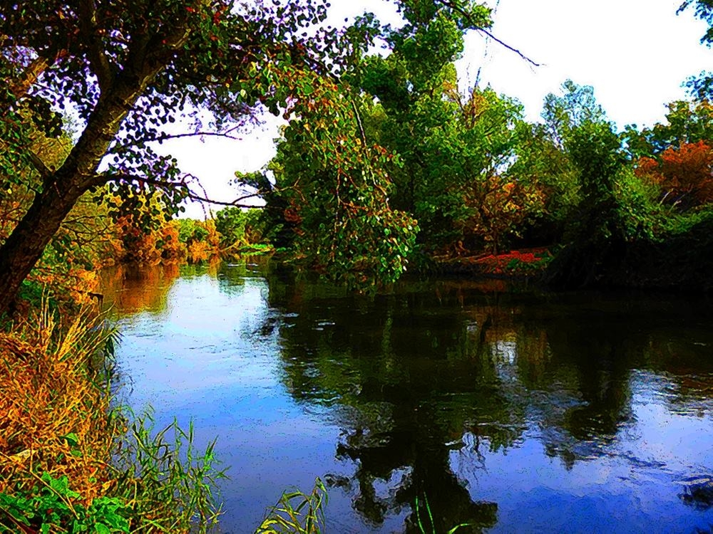 Fotografía tomada en el otoño de 2014 tratada digitalmente como imagen acuarelada.